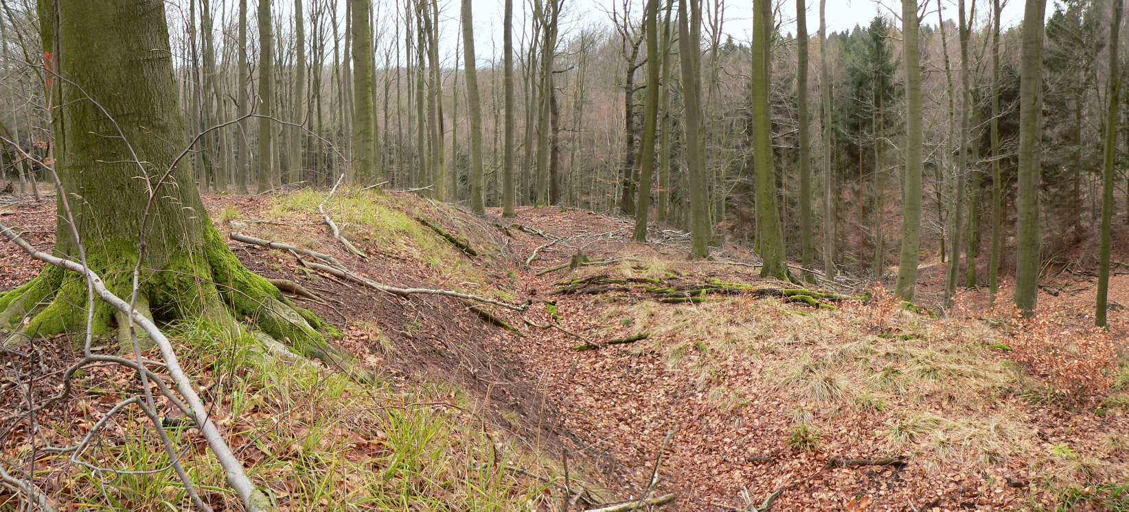 Beusterburg